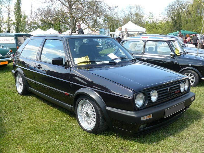 Chelles 2012